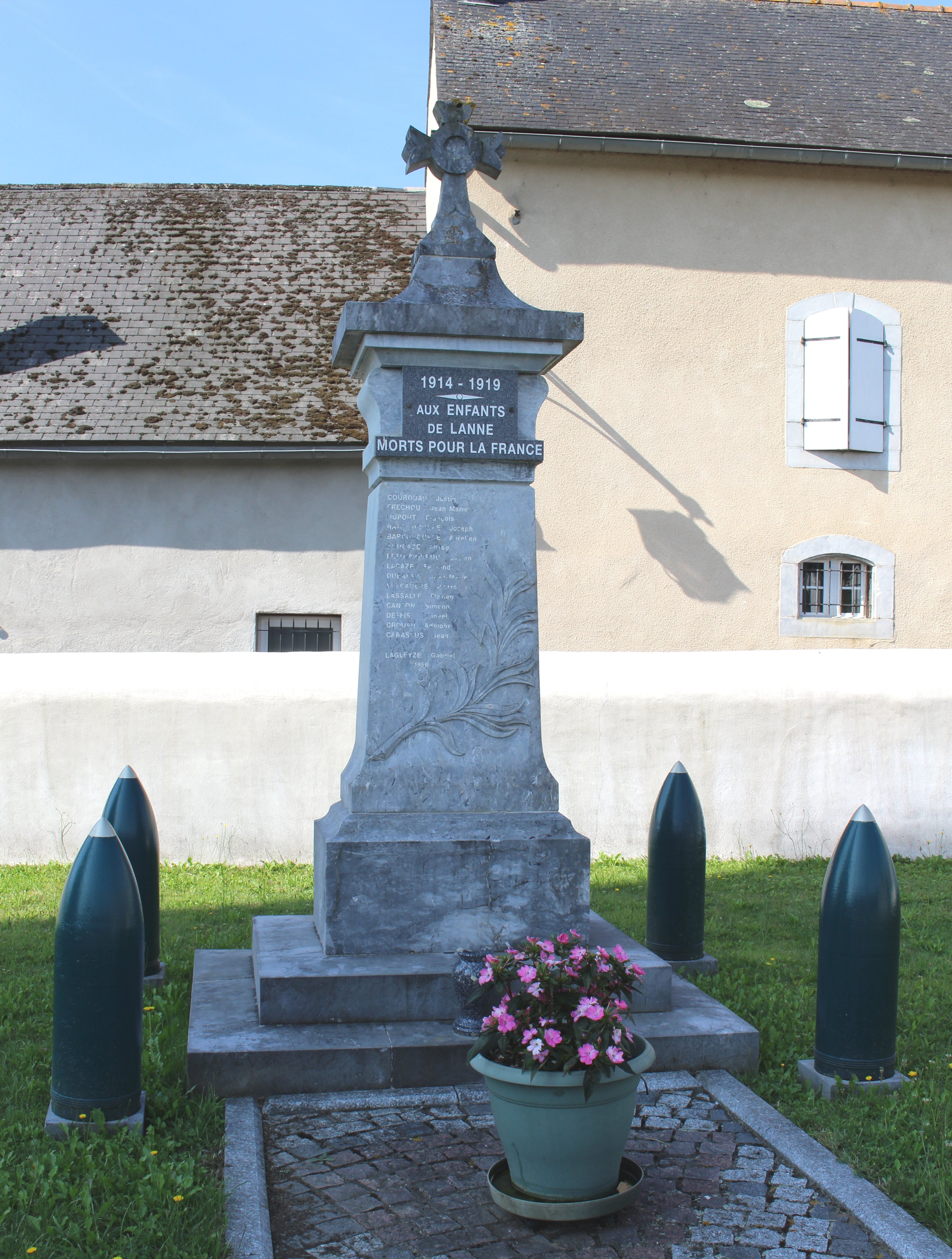 Monument aux morts de Lanne (Hautes-Pyrénées)